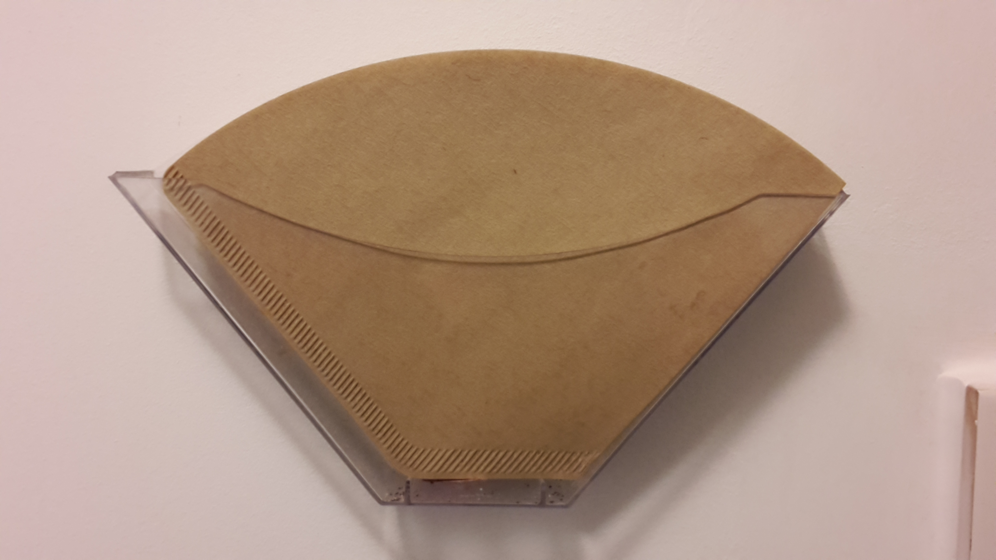 Koffiefilterhouder